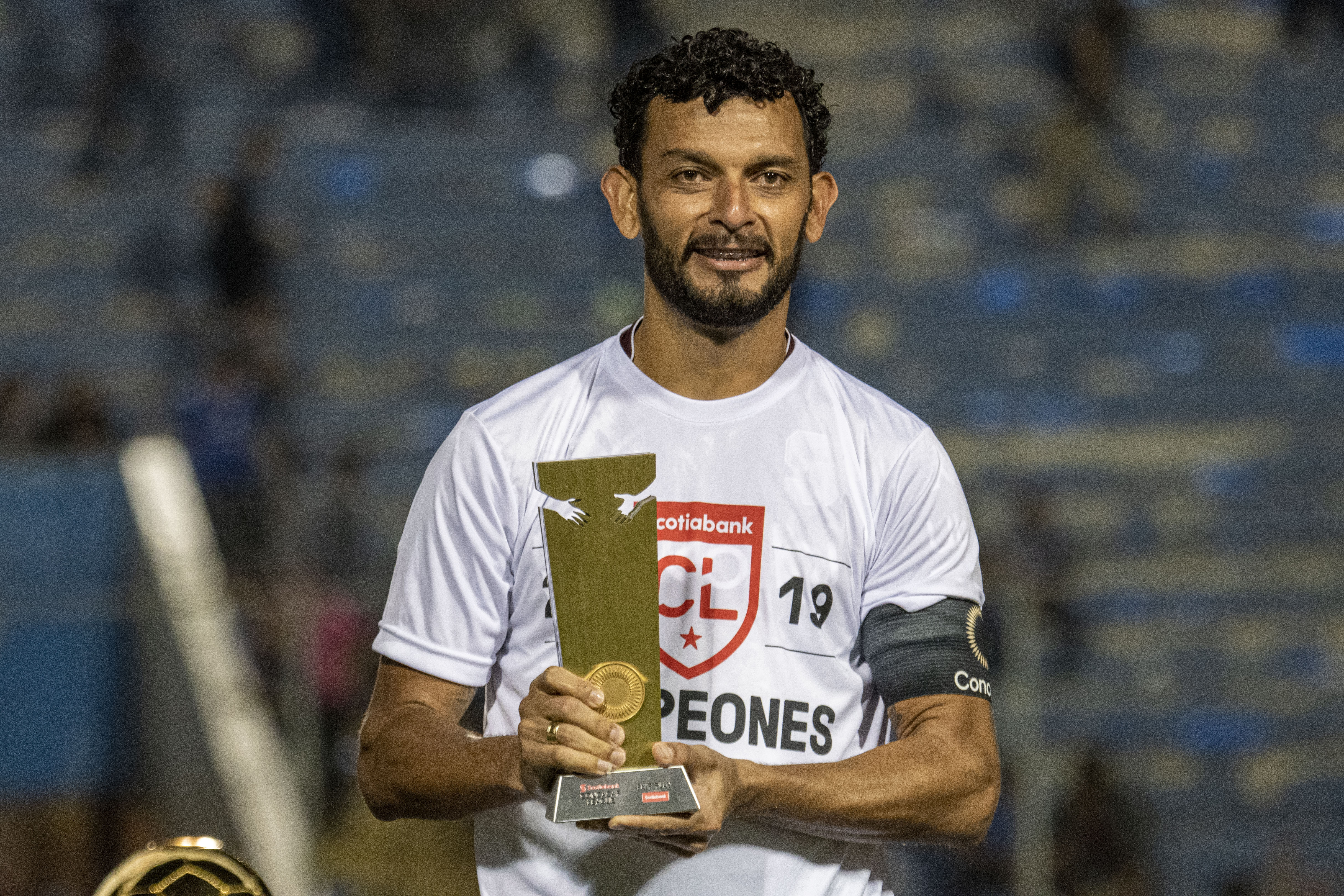 Michael Barrantes, capitán del Deportivo Saprissa, presenta el trofeo a Equipo Fair Play tras ganar la Liga Concacaf 2019